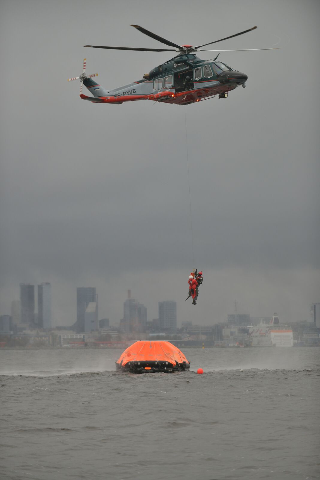 Merepäästeõppus